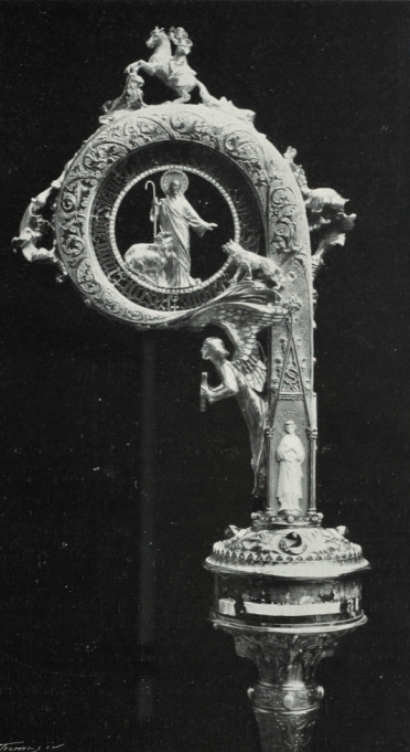 Bàcul del bisbe de Tui. Barcelona, 1907. Or, plata sobredaurada cisellada, esmalts plique-à-jour, diamants, ametistes i altres pedres precioses. Dissenyat per Lluís Masriera i Rosés i modelat per Eusebi Arnau Mascort, amb plaquetes d'ivori treballades per Josep Bernadàs. Fotografia de Miquel Matorrodona. Fototípia de la casa Josep Thomas i Bigas. Publicada a la revista Ilustració Catalana, 6 d'octubre de 1907, Barcelona. Procedeix de l'Arxiu de Revistes Catalanes Antigues, impulsat per la Biblioteca de Catalunya. Es conserva al Museu Nacional de Artes Decorativas de Madrid, es conserven reproduccions dibuixades al Llibre de Taller 1905 - 1908, amb data de 20 de juny del 1907 i hi consta l'encàrrec.